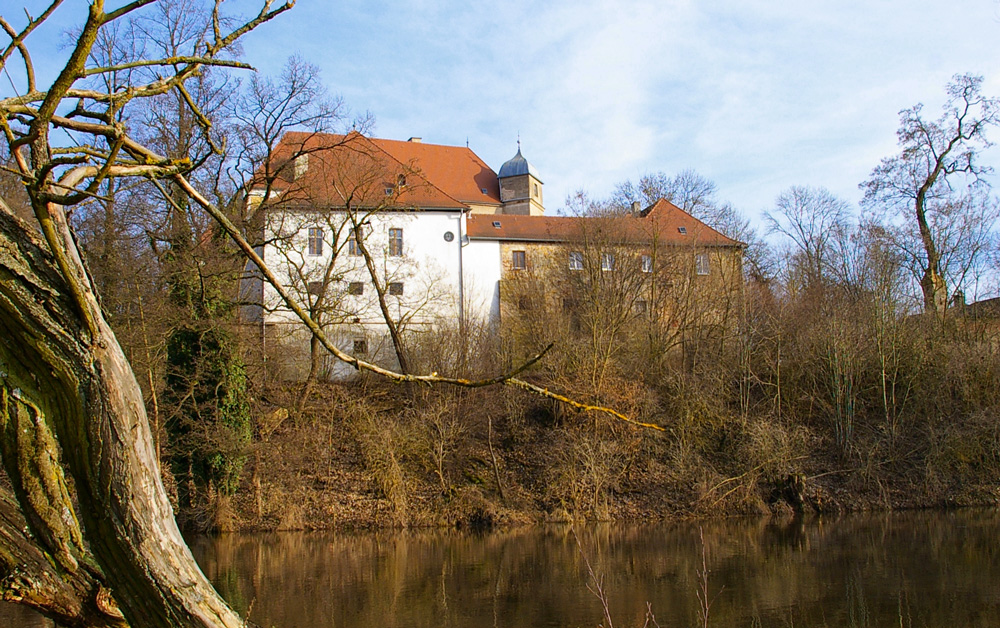 Schloss Fronberg